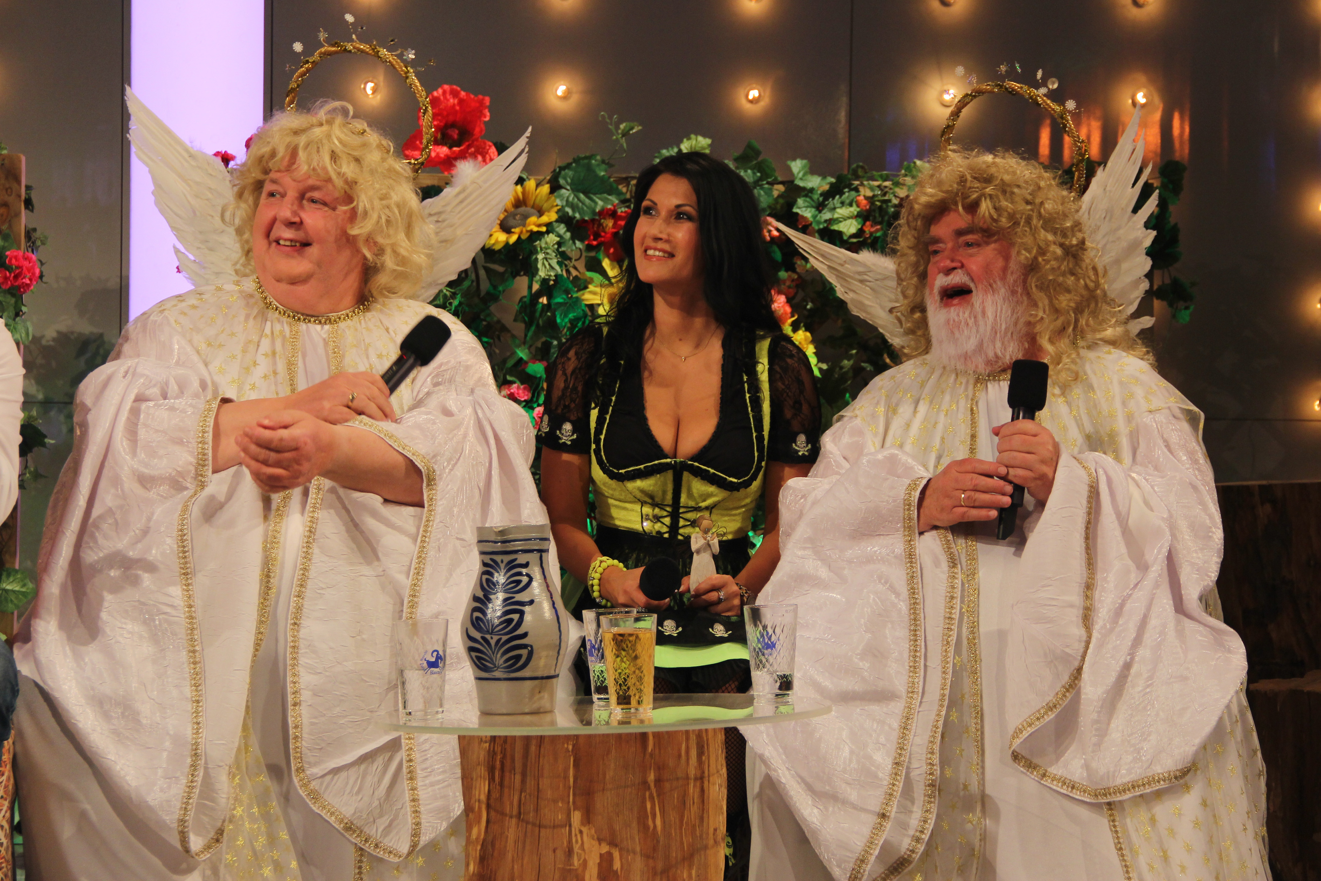 Antonia aus Tirol mit den Wildecker Herzbuben bei der Aufzeichnung zu "Hier spielt die Volksmusik" auf dem Hessentag 2015 in Hofgeismar.